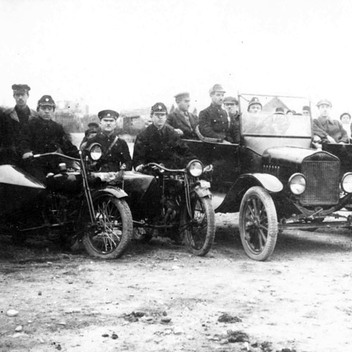 Баку в 1920-е годы. Бакинская рабоче-крестьянская милиция